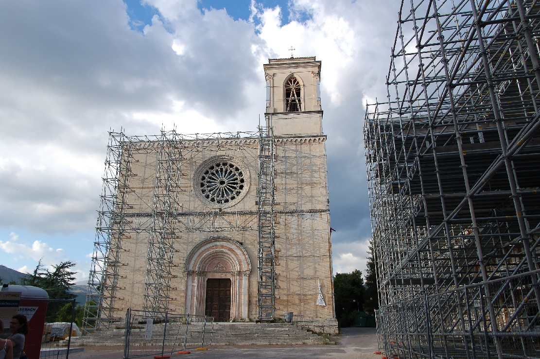 L'Aquila 2011